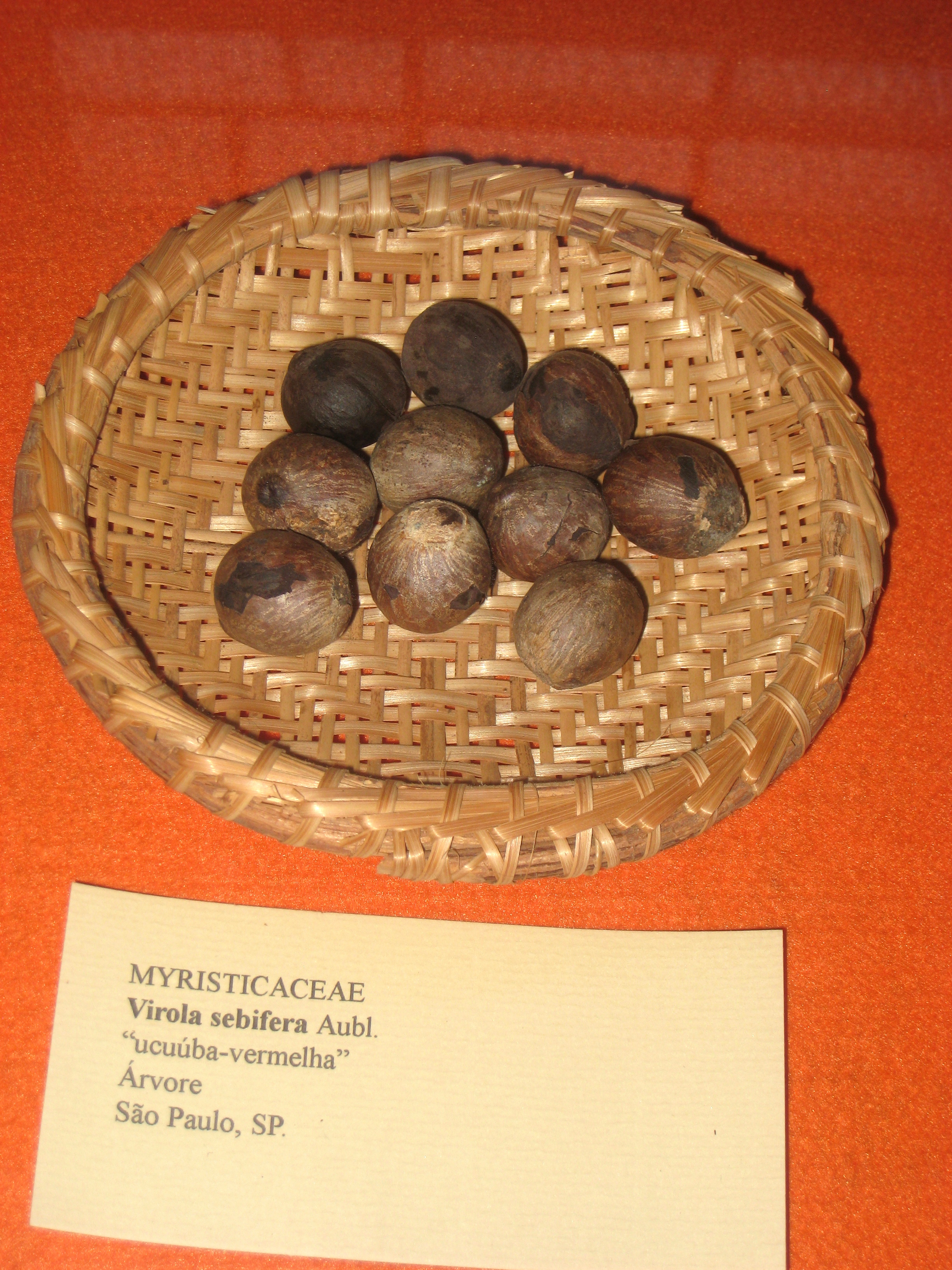 Virola sebifera specimen in the Museu Botânico Dr. João Barbosa Rodrigues, Jardim Botânico de São Paulo, São Paulo City, SP, Brazil.